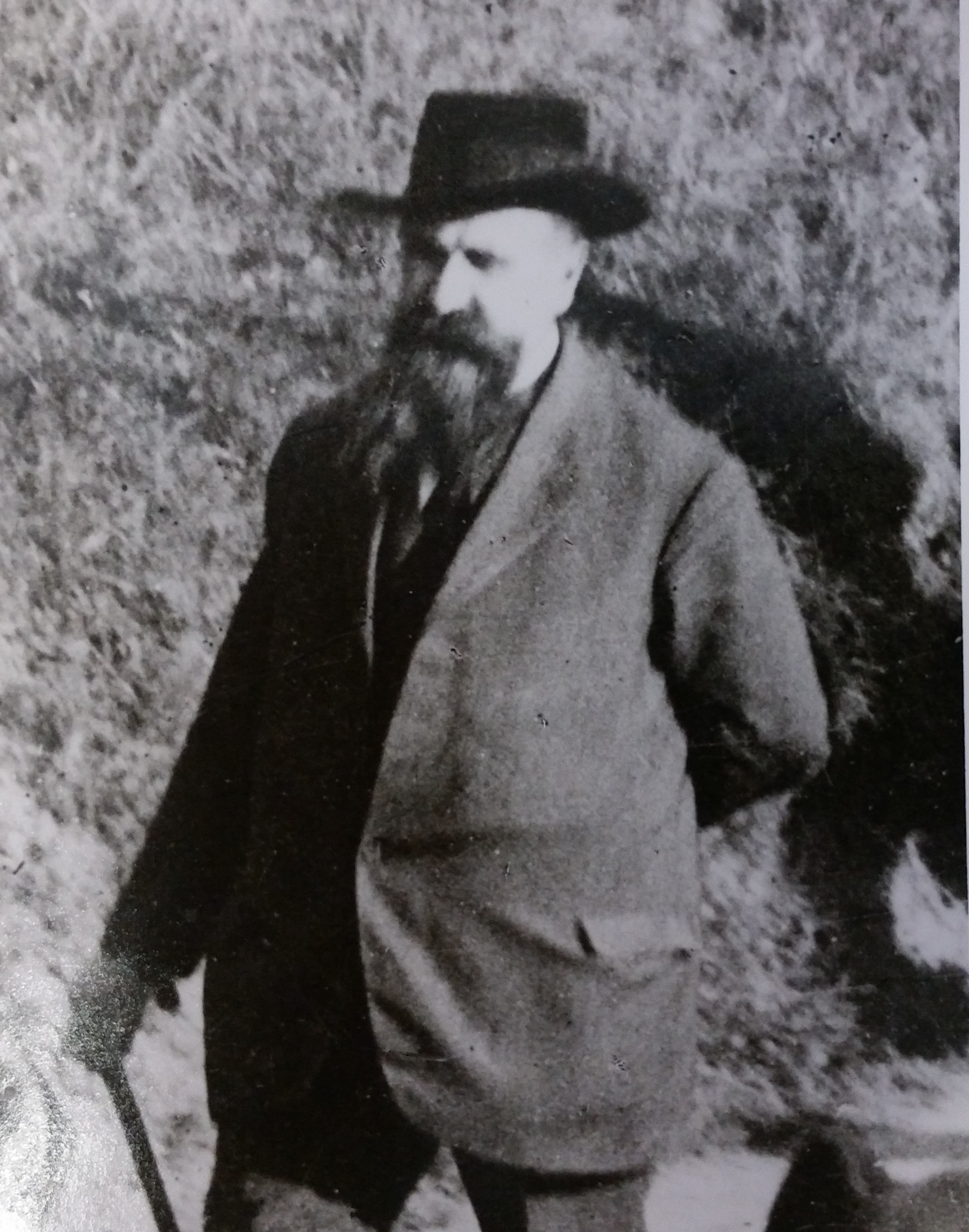 Bernharf Kleff um 1927